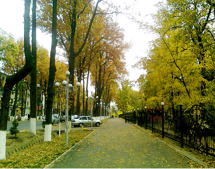 Некода Проспект Мира, а сейчас это проспект "Бейбитшилик".